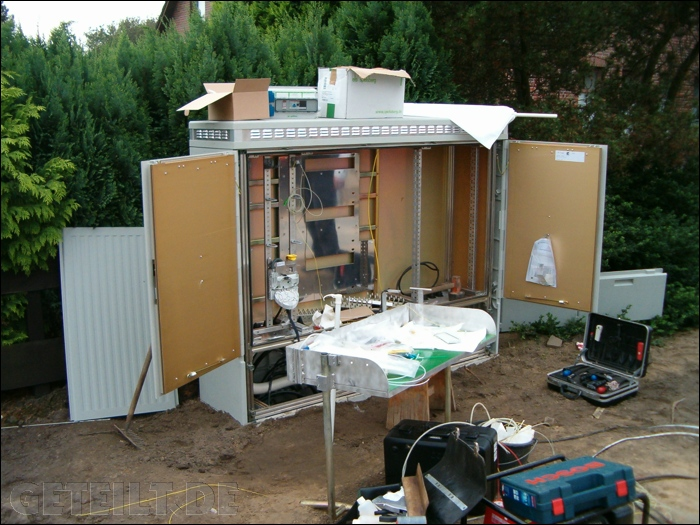 Mfg18 geöffnet